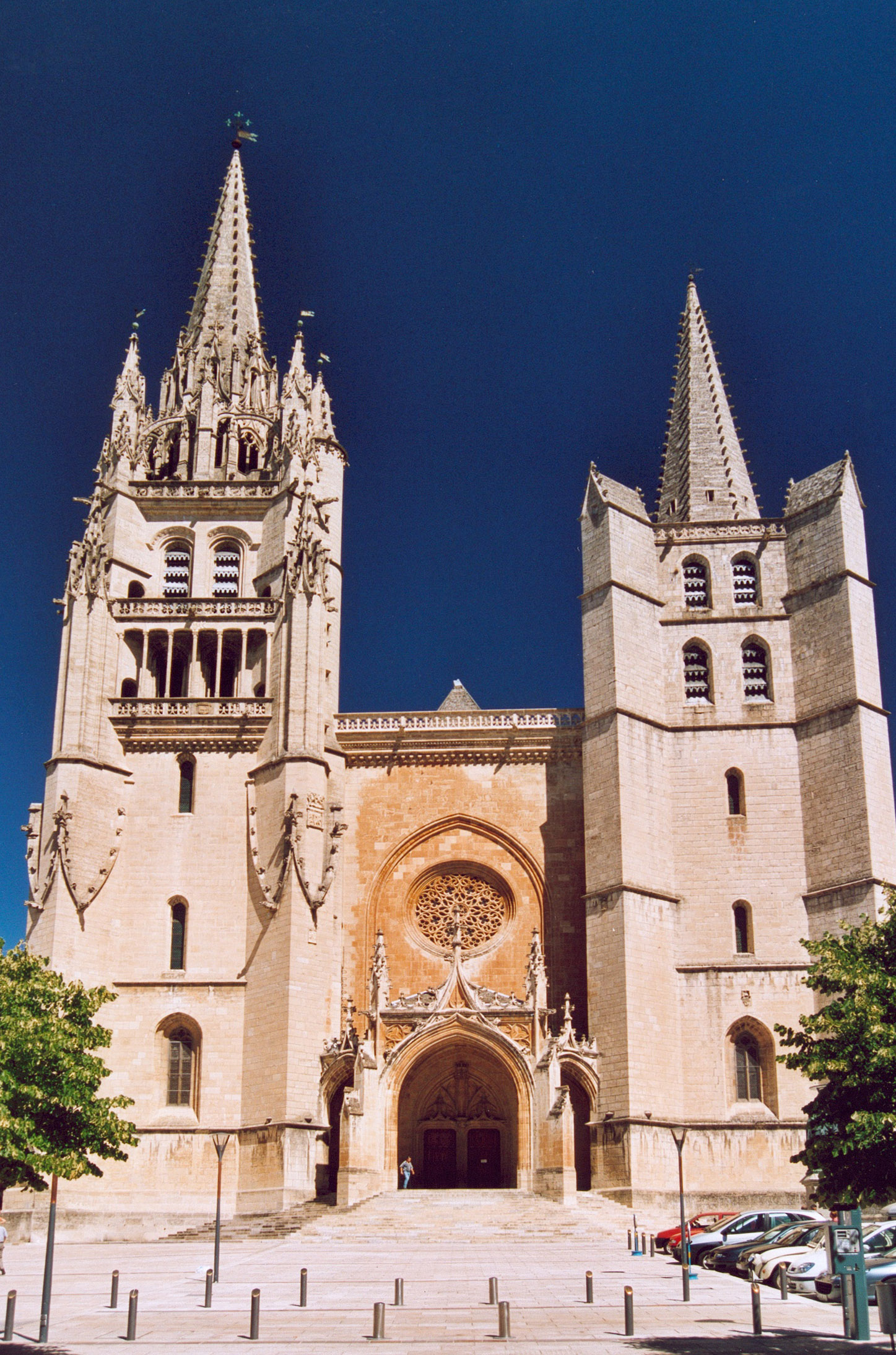 France Lozère Mende Le parvis de la Cathédrale Photographie prise par GIRAUD Patrick Août 2005